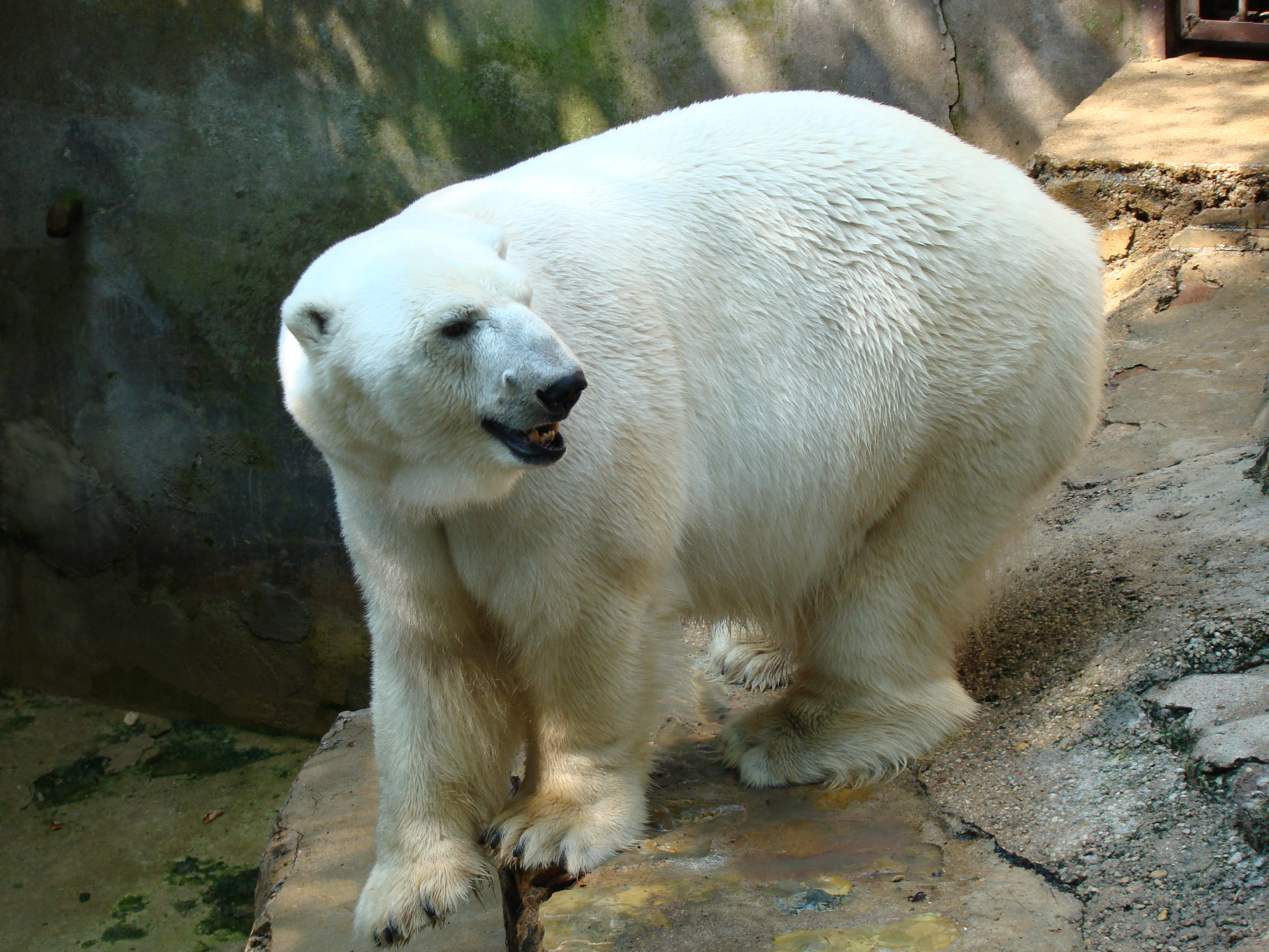 Baltasis lokys Kauno zoologijos sode.